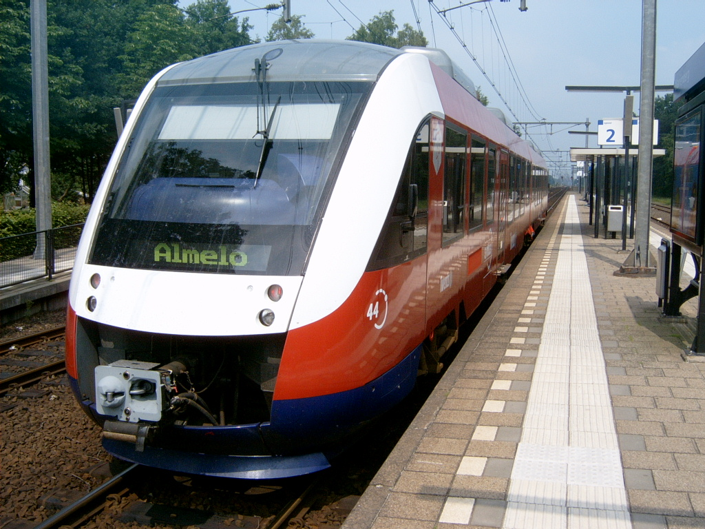 Een speciale rode LINT op station Marienberg.